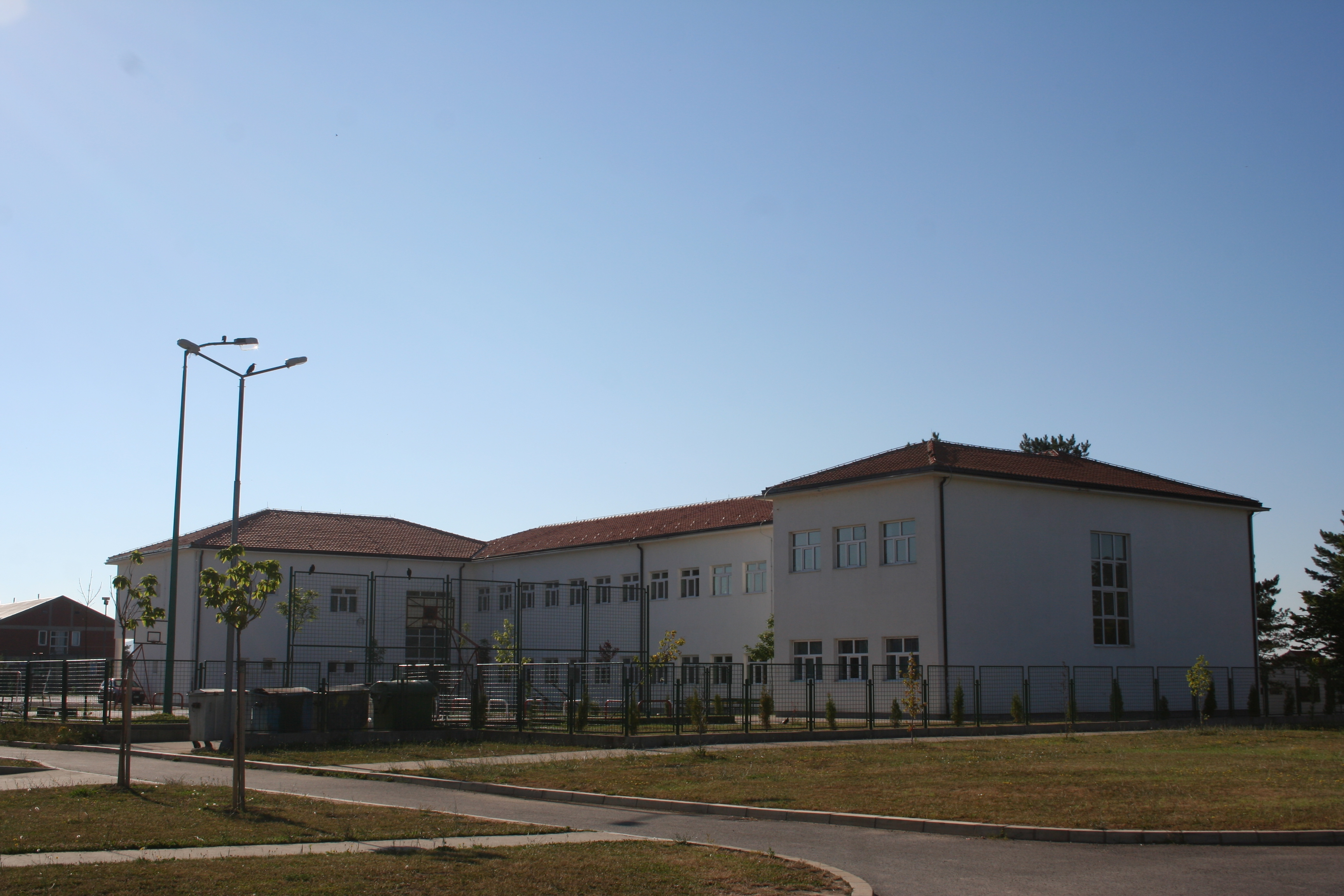 Lajkovac